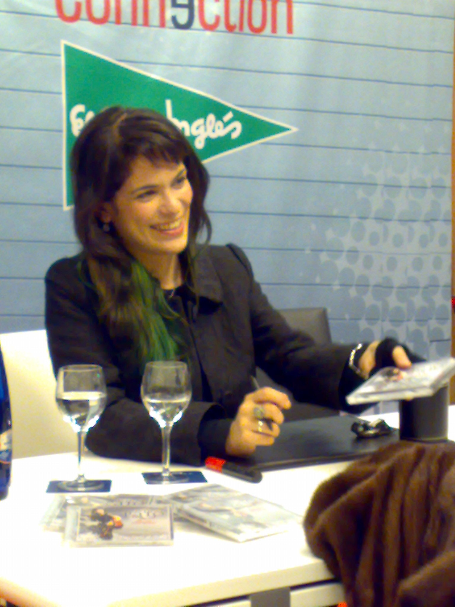 Cristina Pato asinando exemplares do seu último disco, The Galician Connection (2010), en El Corte Inglés de Vigo.